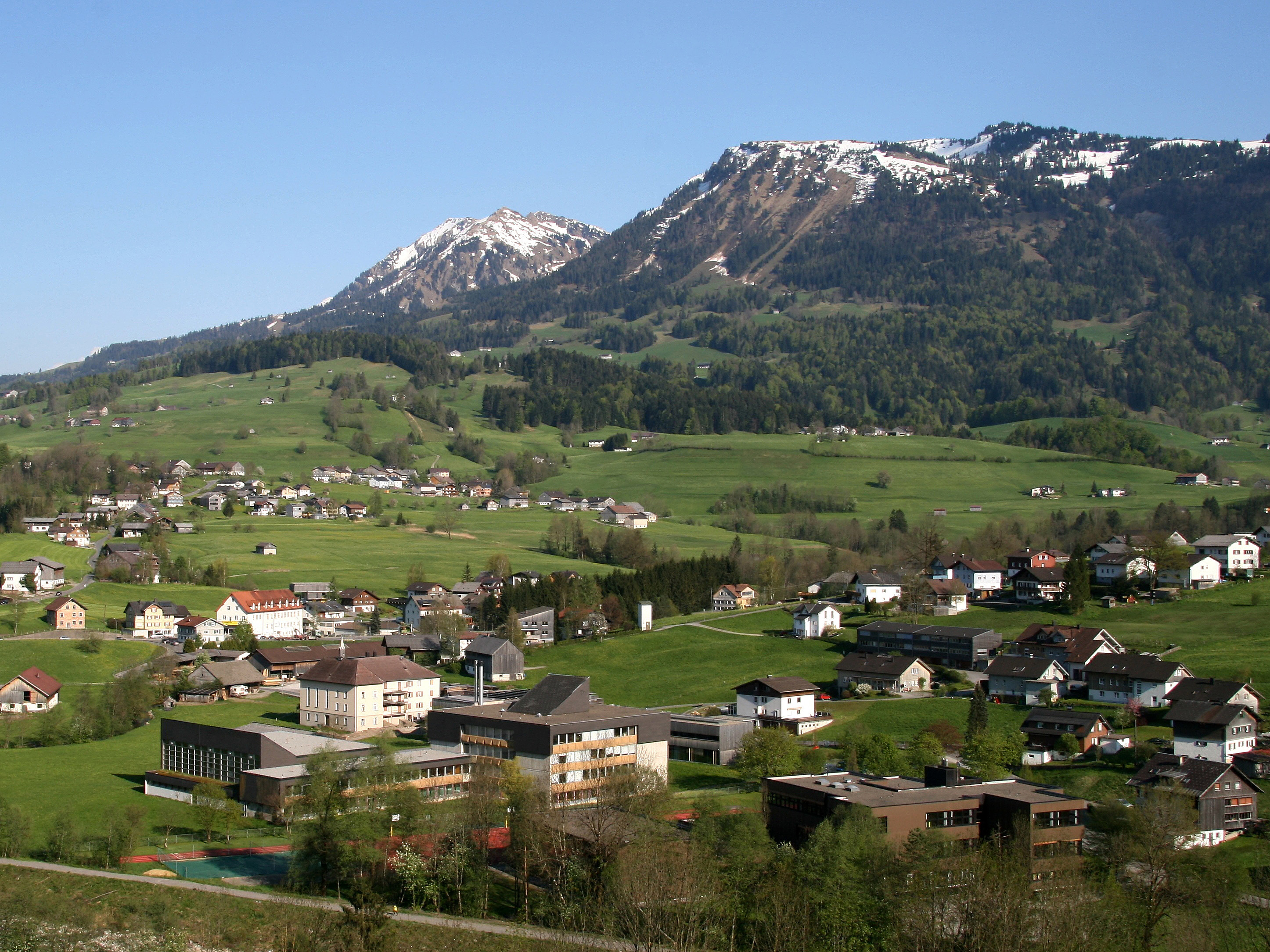 Blick von Kammern in Egg, Vorarlberg über die Ortsteile Pfister und Klebern auf Rain. Im Bildvordergrund das Bundesgymnasium Egg, in der Bildmitte das Vinzenzheim (siehe Artikel Brand im Vinzenzheim in Egg 2008. Im Hintergrund die Vordere Niedere 1.586m, der Tristenkopf 1.741m und die Winterstaude 1.877m.